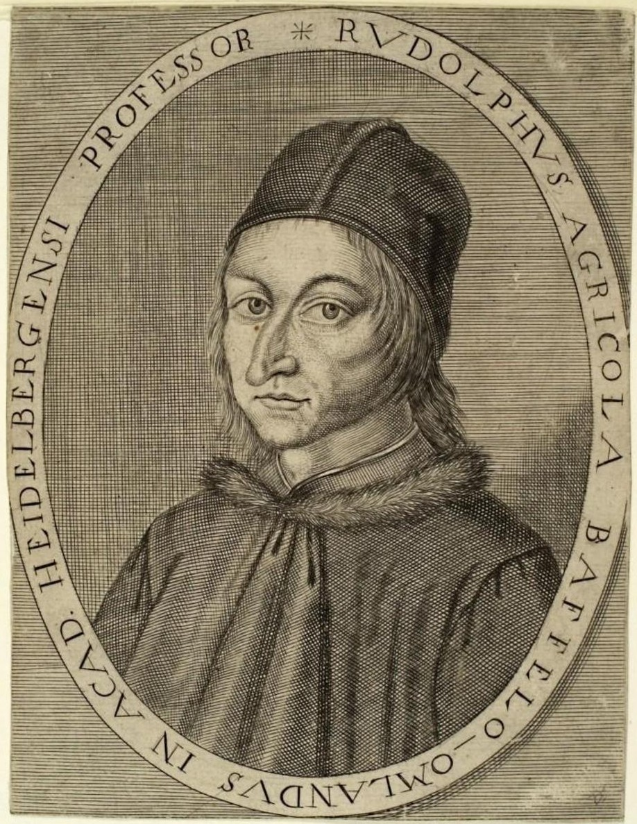 Rudolf Agricola. Heidelberg / Universitätsbibliothek, Inv.Nr./Signatur: Graph. Slg. I.a.9. Kupferstich: 12,5-12,7 cm x 16,5 cm